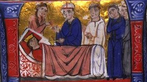 Mort d'Isabelle de Brienne et Frédéric II quittant Brindisi